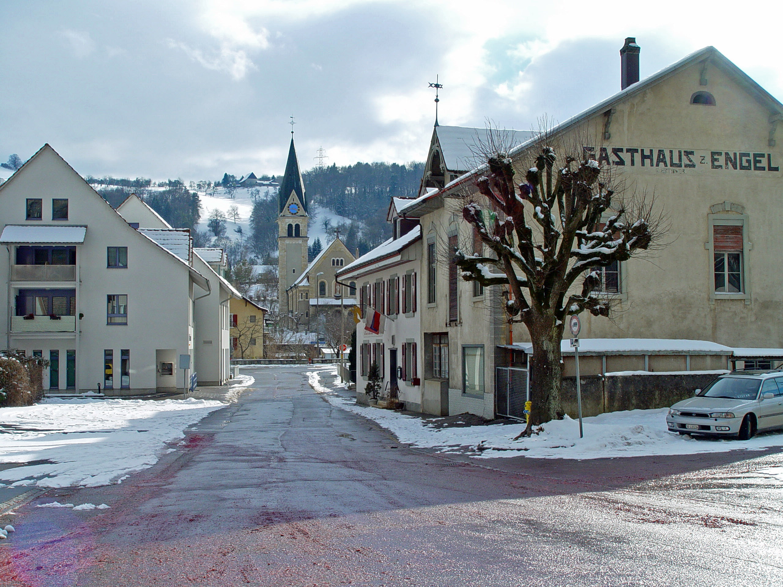 Dorfkern Kleinlützel bei Schnee